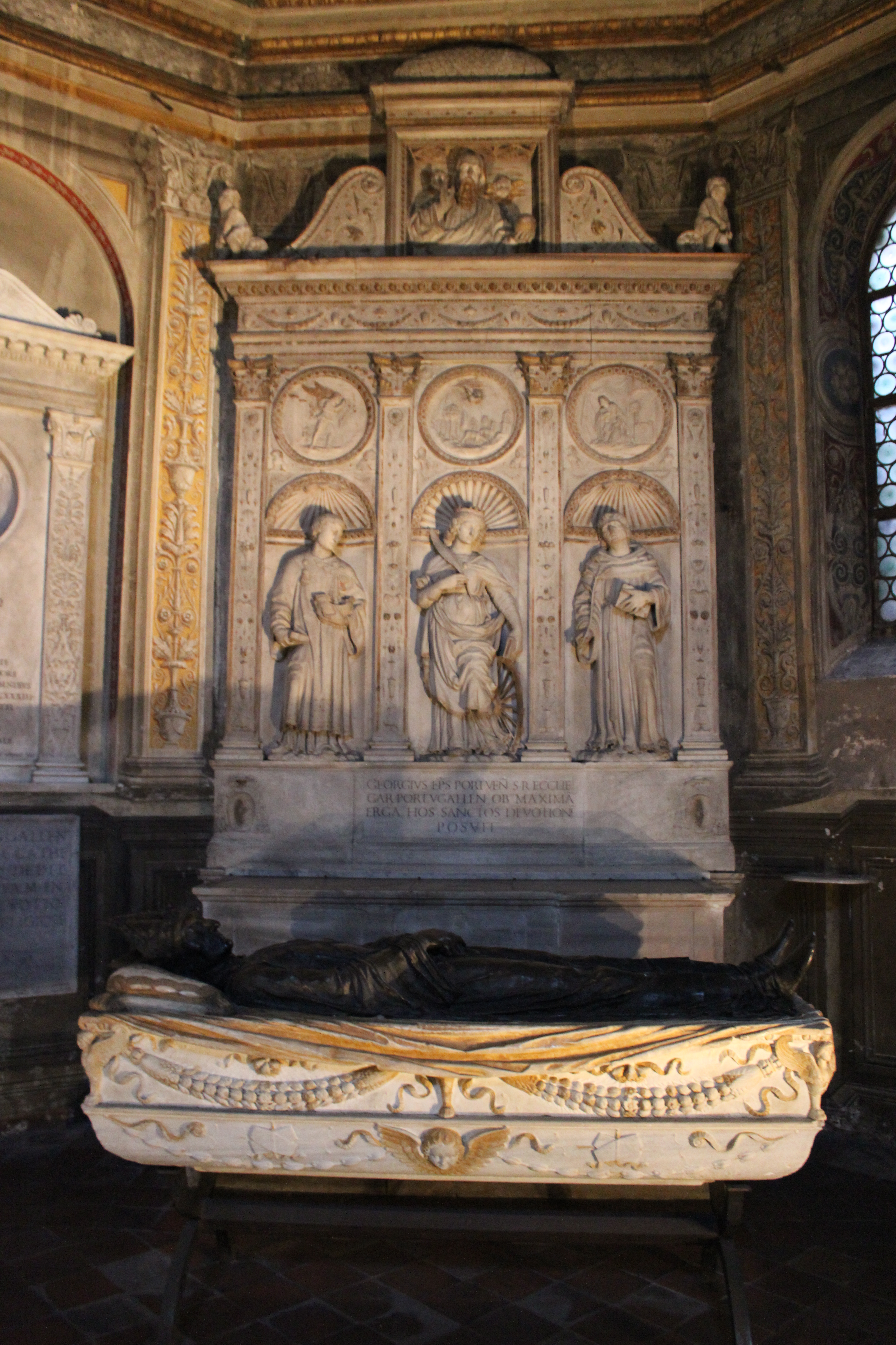 Roma. Santa Maria del Popolo. Capilla Costa.